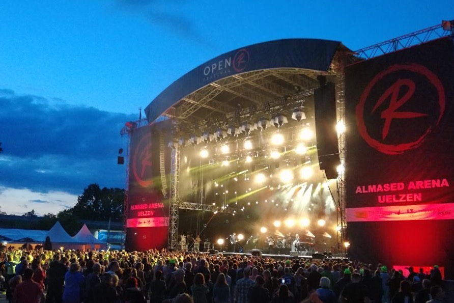 Uelzen Open R Festival 2017